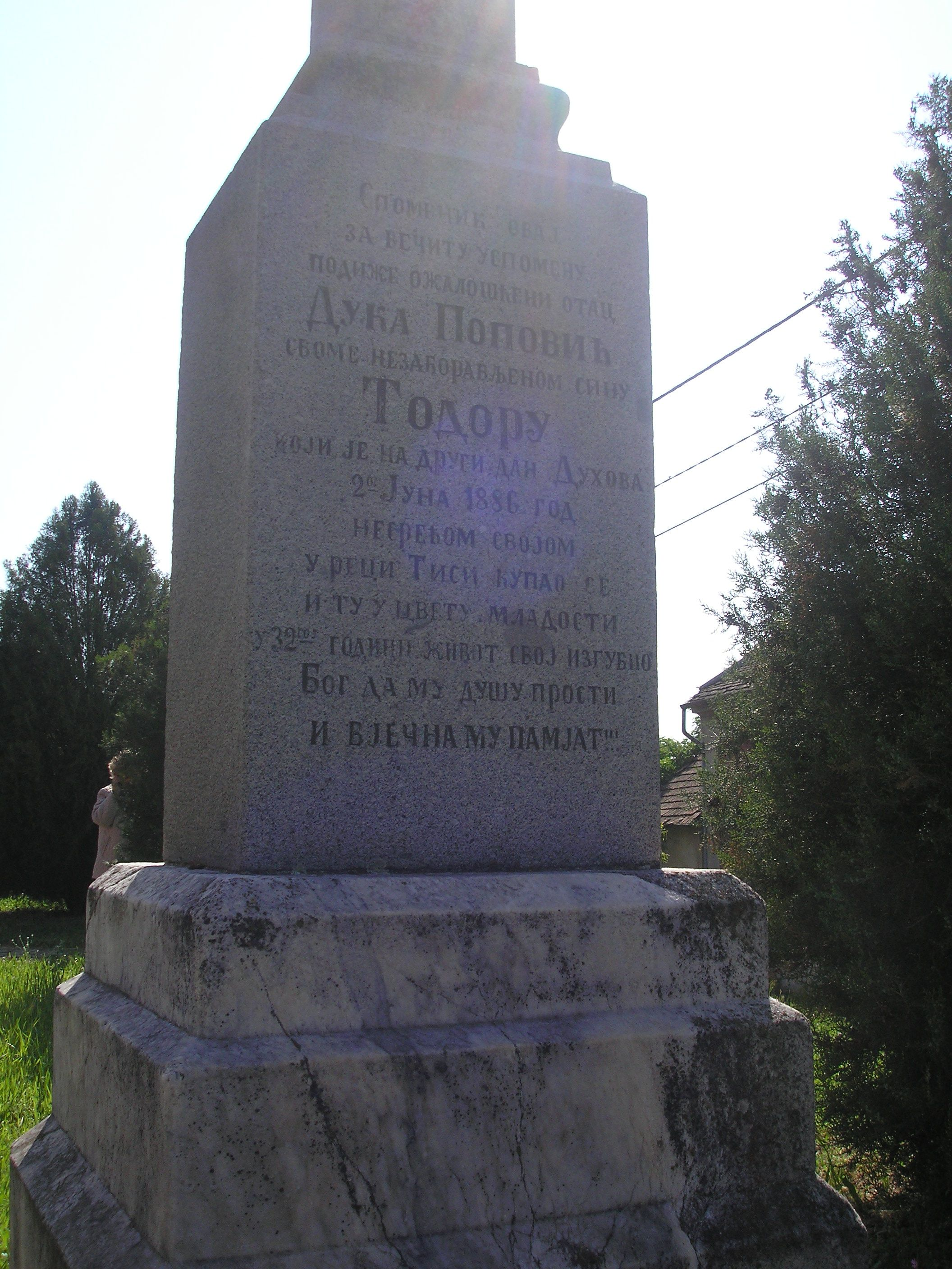 Emlékkereszt (Szerb ortodox templom, Szeged-Szőreg, Magyarország)